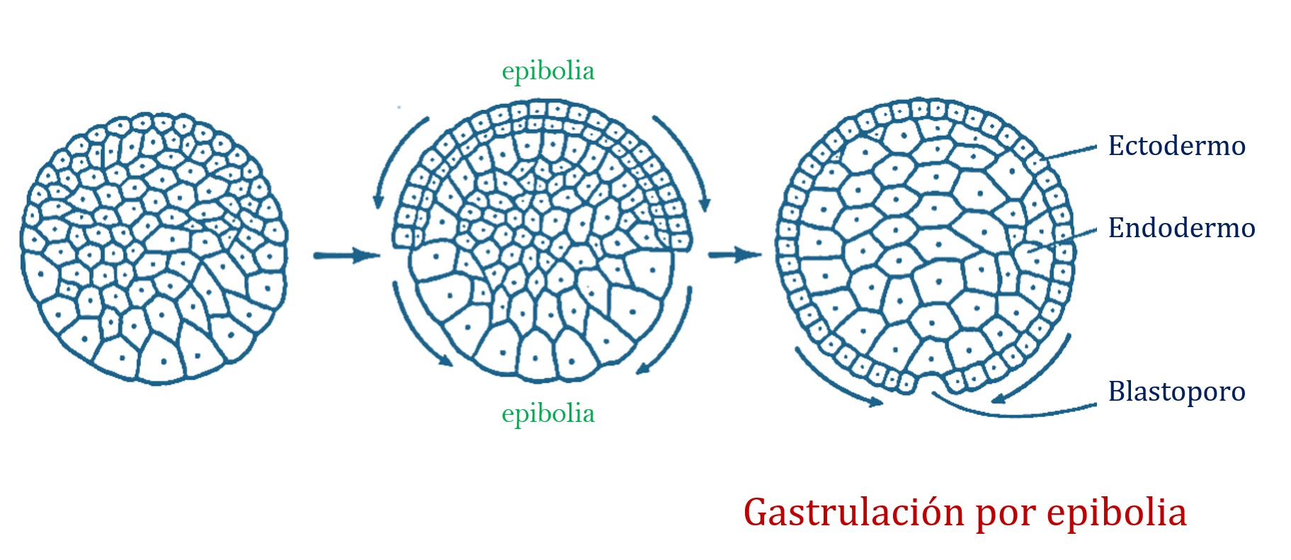 Epibolia